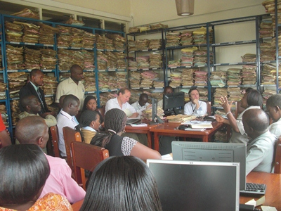 Atelier sur la modification des méthodes de travail, avec les personnels du ministère et les experts du projet